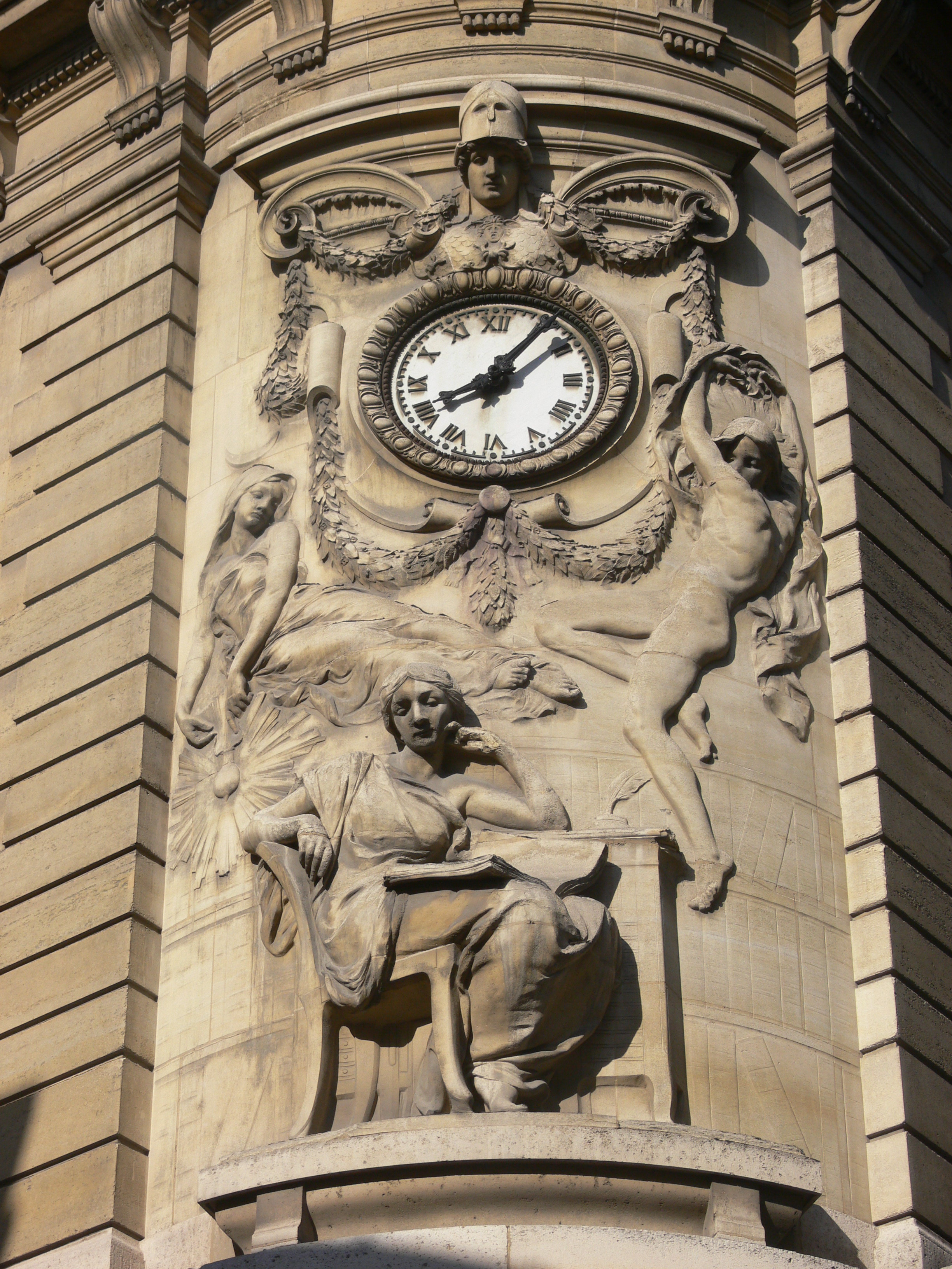 Bibliothèque nationale de France - site Richelieu : bas-relief à l'angle de la rue Vivienne et de la rue Colbert